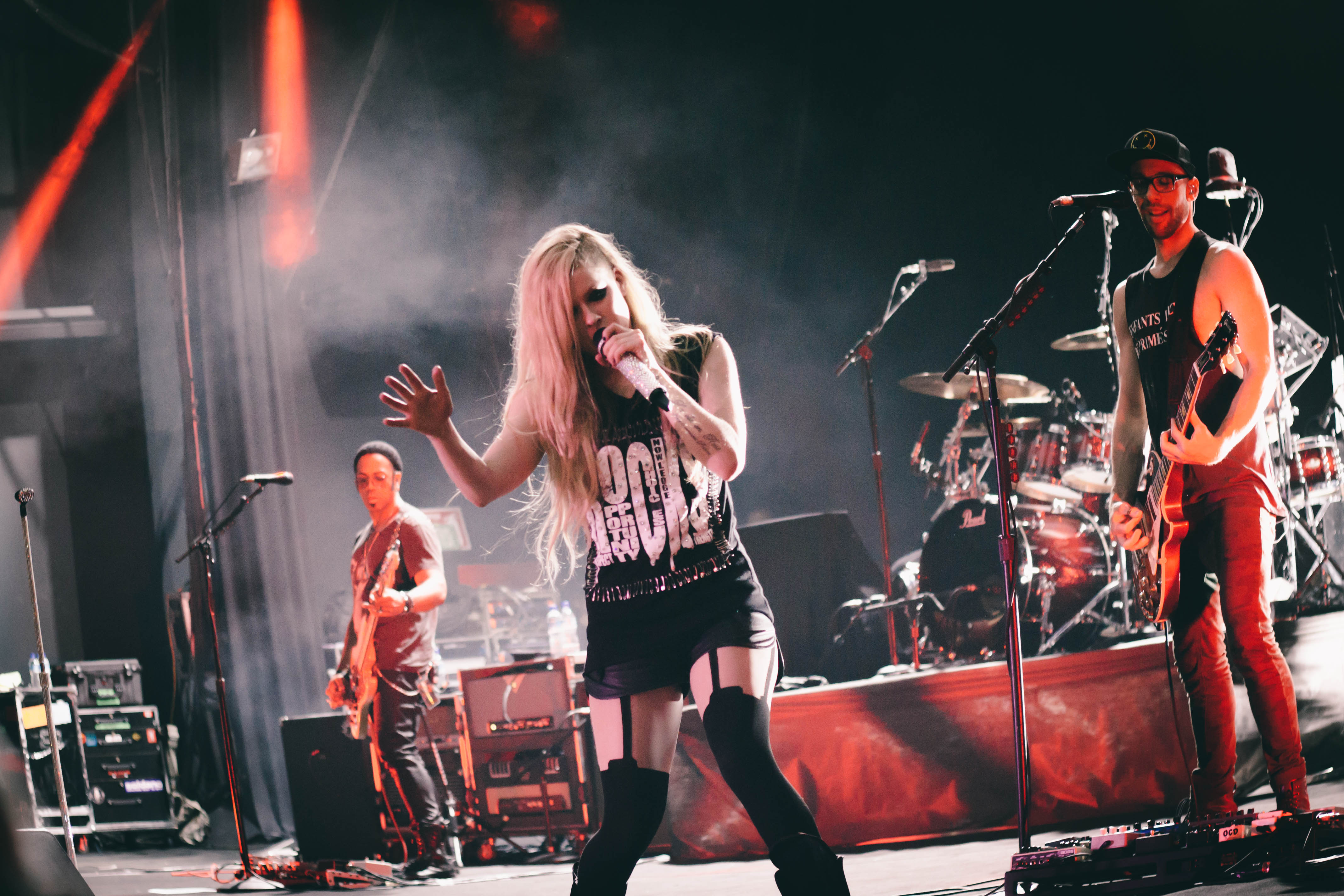 Avril Lavigne in Brasilia, Brazil in The Avril Lavigne Tour